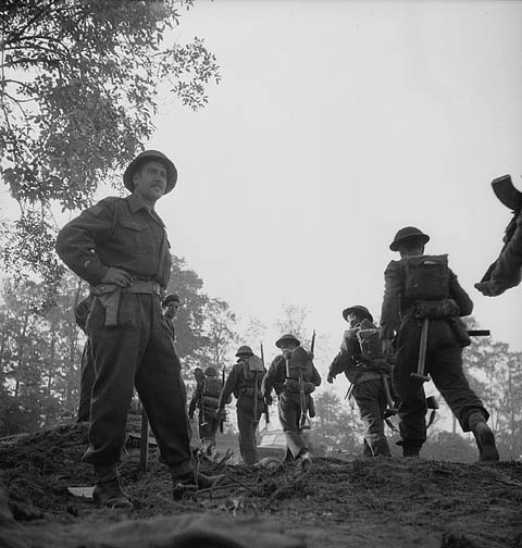 infanterie canadienne en Normandie